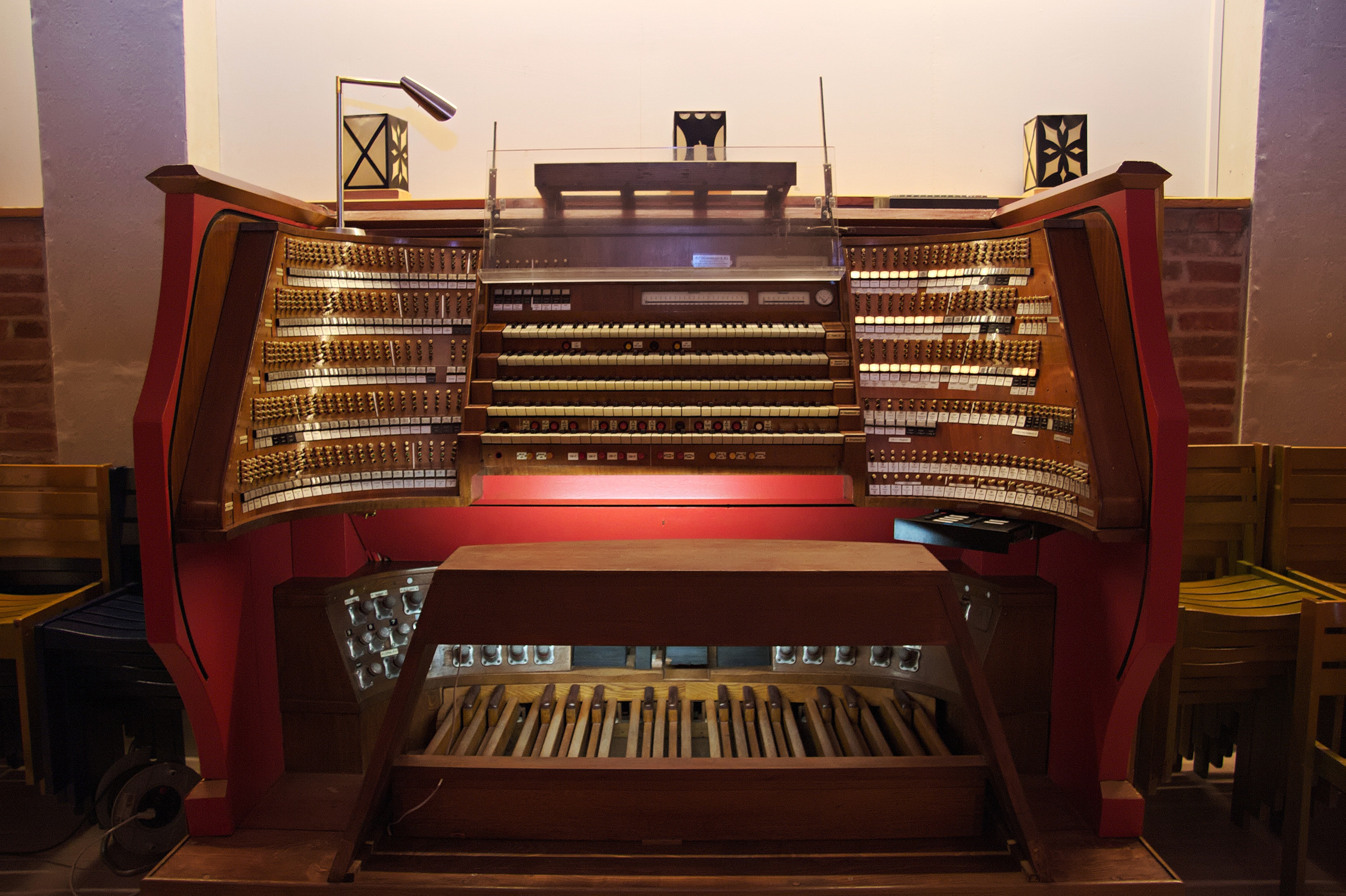 historischerZentralorgelspieltisch St. Lorenz Nürnberg (Steinmeyer 1936-1937)